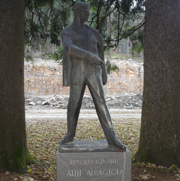 Споменик револуционару Алији Алијагићу (1896-1922) у парку у Делницама.